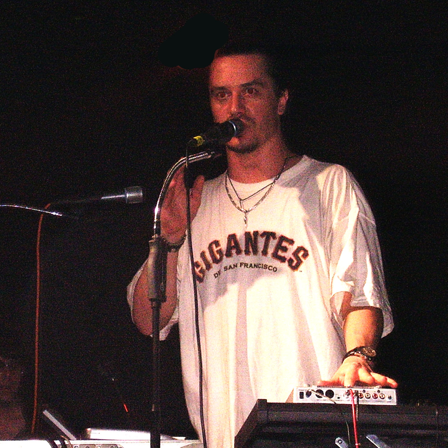 Mike Patton a bologna